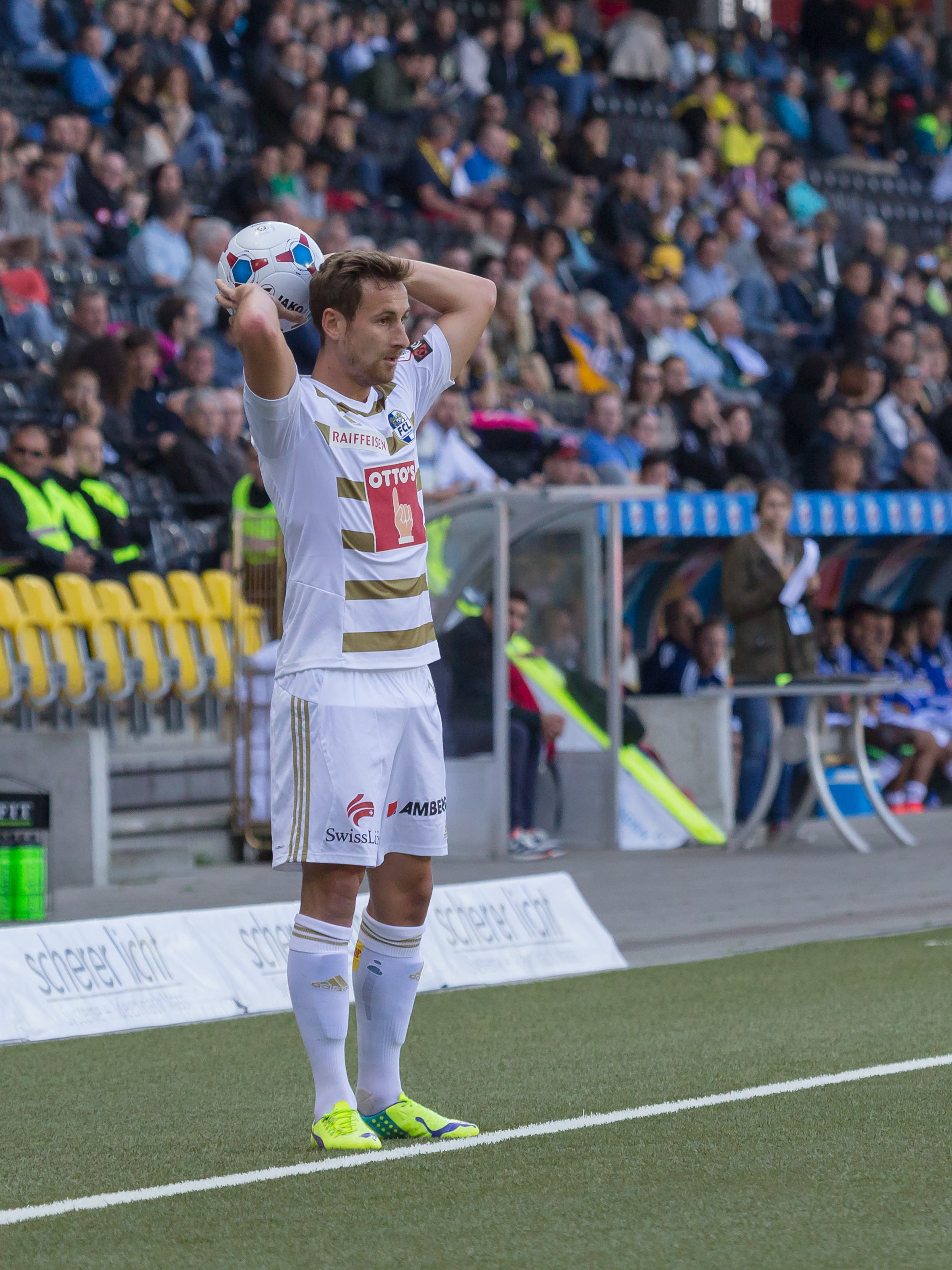 Jérôme Thiesson beim Spiel des BSC Young Boys gegen den FC Luzern